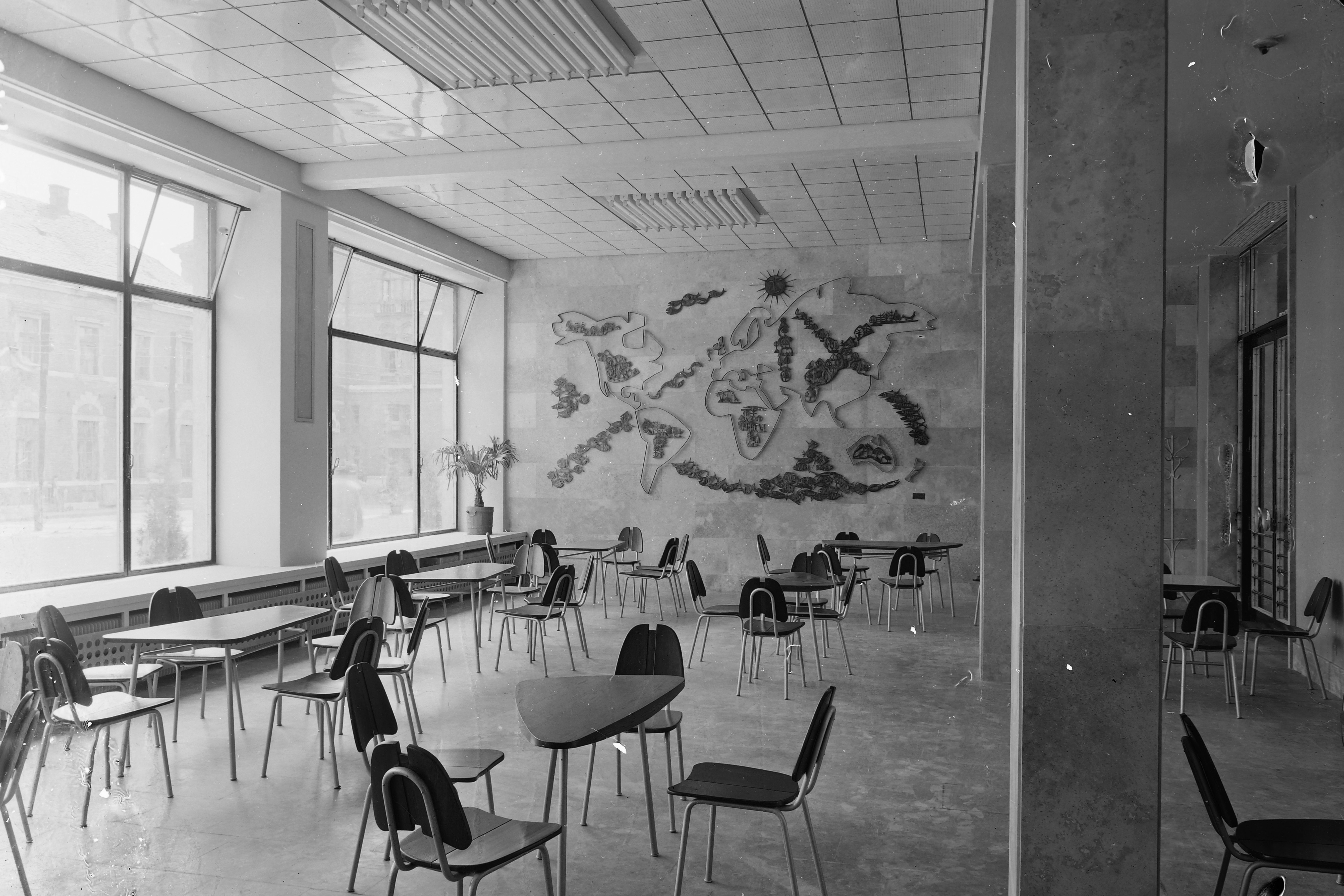 Nagyállomás, kultúrváróterem, a falon a Világtérkép c. kompozíció (Percz János, 1961., vas, réz)[1]. Location: Hungary, Debrecen Tags: interior, waiting room, furniture, map Title: Nagyállomás, kultúrváróterem, a falon a Világtérkép c. kompozíció (Percz János, 1961.).